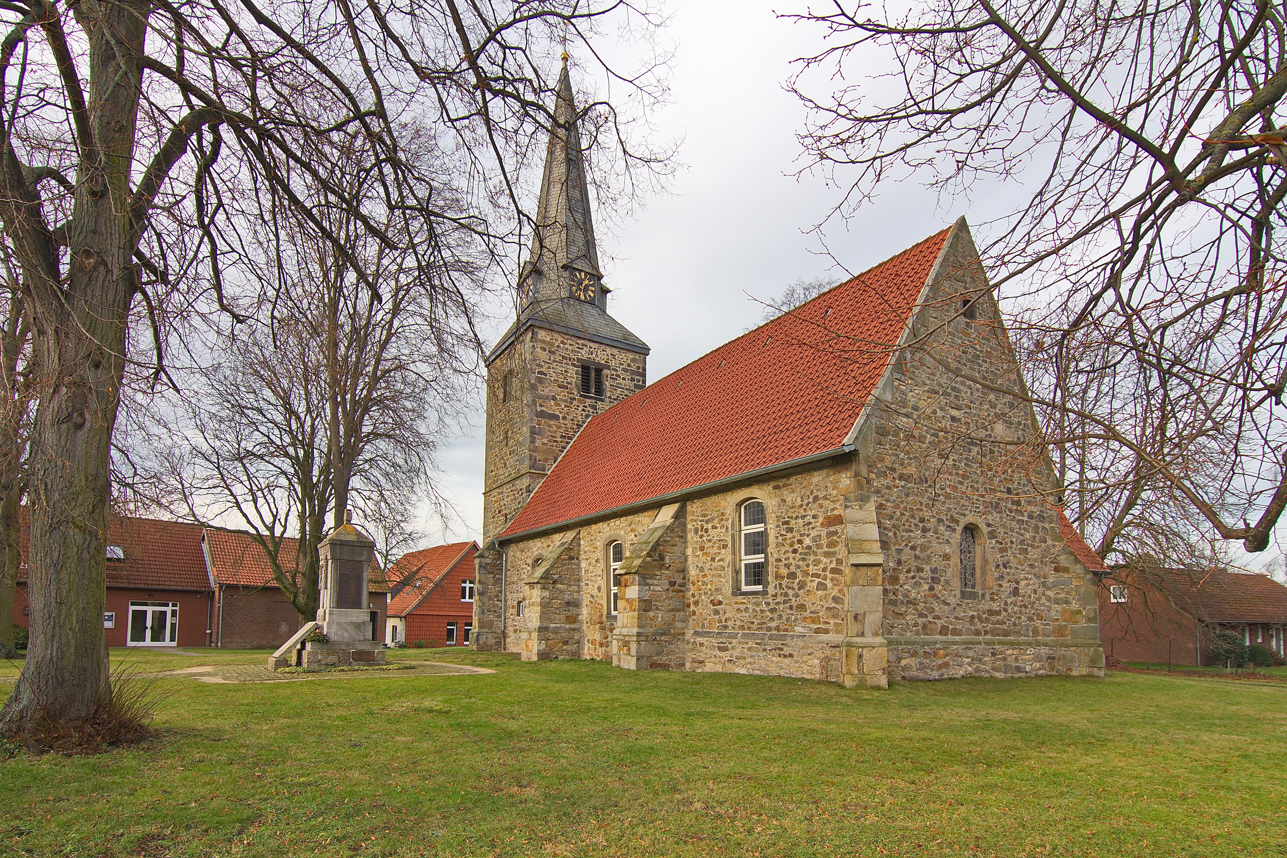 Heilig-Kreuz-Kirche in Kirchdorf (Barsinghausen), Niedersachsen, Deutschland